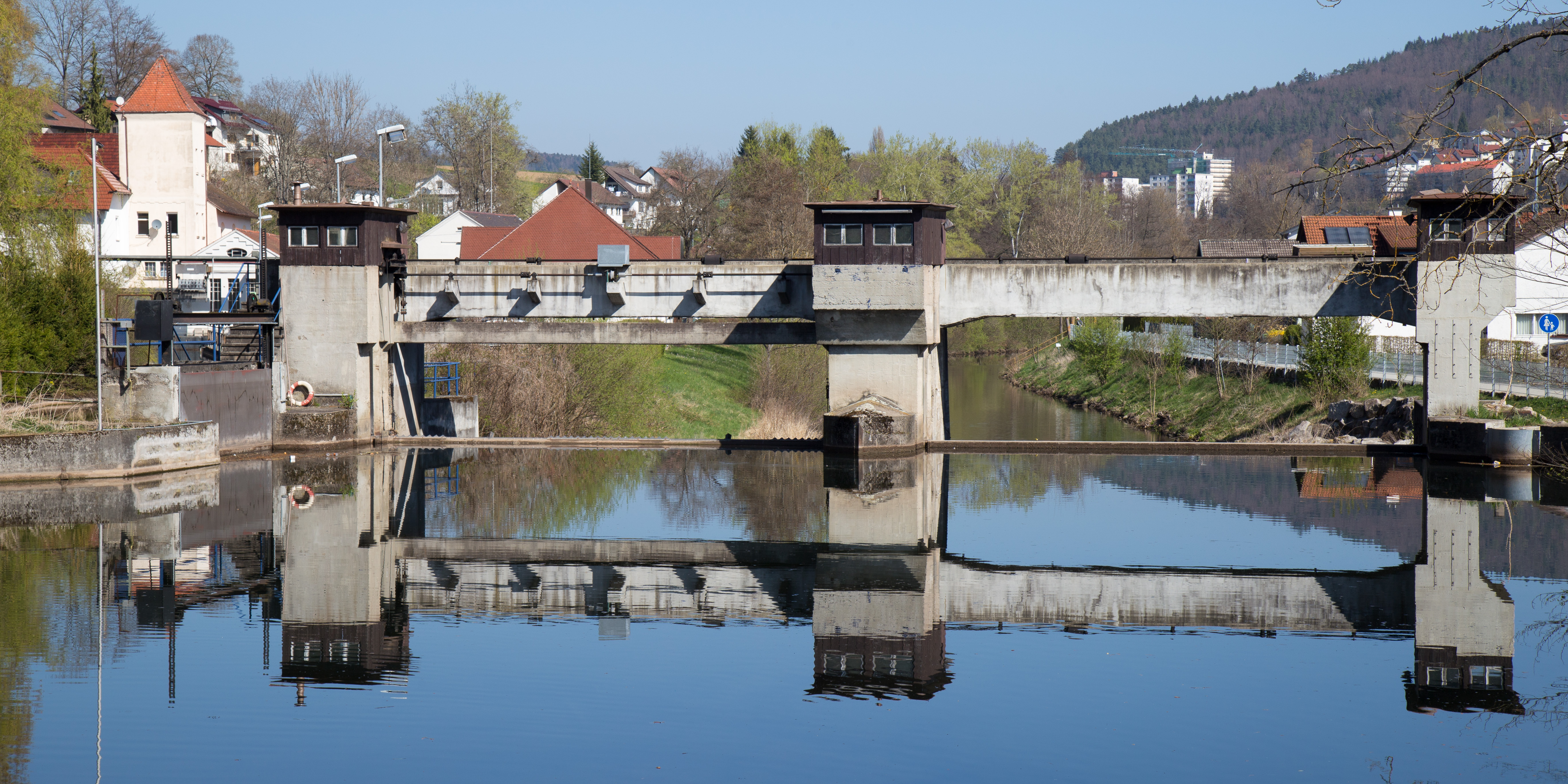 Stauwehr des Wasserkraftwerks Nagold